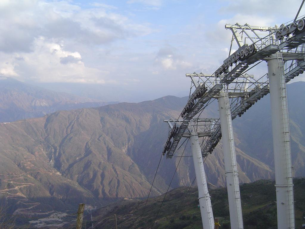 Panorámica del cañón del Chicamocha contrastado con el inicio del descenso del teleférico de Chicamocha saliendo de la estación Mesa de los Santos.